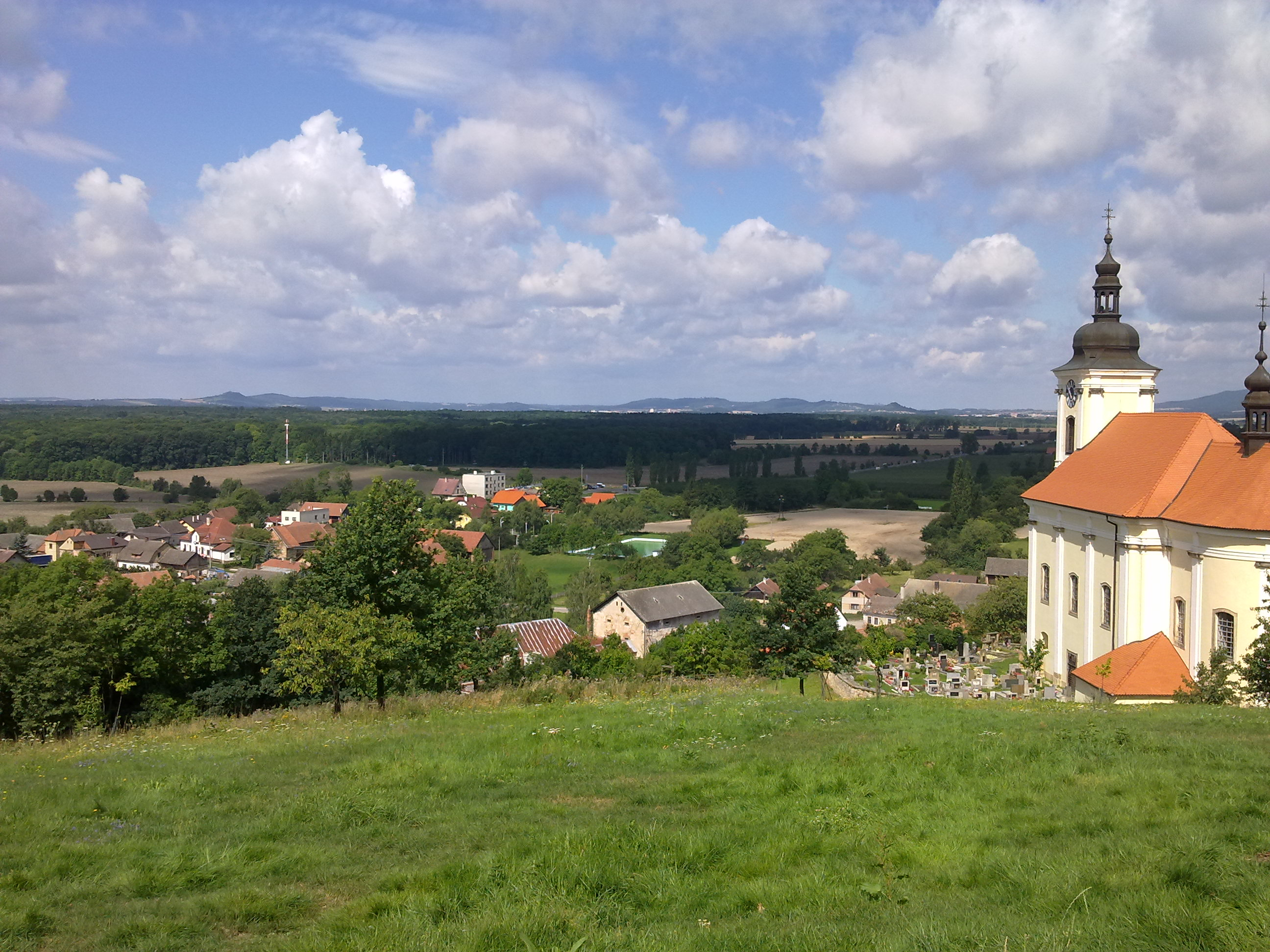 Obec Konecchlumí, pohled od kostela